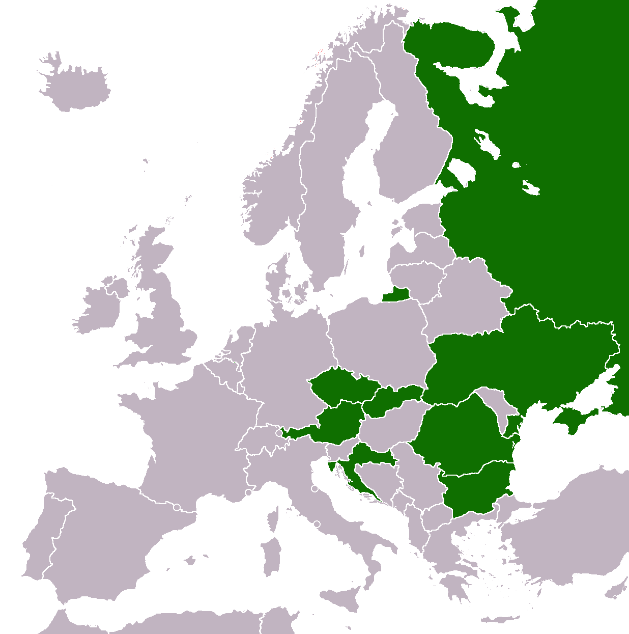 Billa in Europe